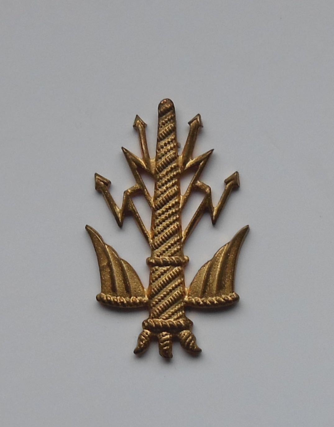 Kenteken, 35 mm, uitgevoerd in dunne koperplaat